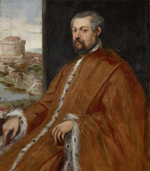 Paolo Tiepolo (1523-1585) Prokurator und Cavaliere, Diplomat und Staatsmann, Gesandter am französischen Hof Heinrichs II., am spanischen Hof Philipps II. und unter den Päpsten Pius IV. und V. im Vatikan. Er förderte die Heilige Allianz gegen die Türken, die zum Sieg in der Schlacht von Lepanto 1571 führte. Als Vorsitzender des Gesundheitsamtes des Staates Venedig bekämpfte er die schwere Pestepidemie Mitte bis Ende der 1570er Jahre.